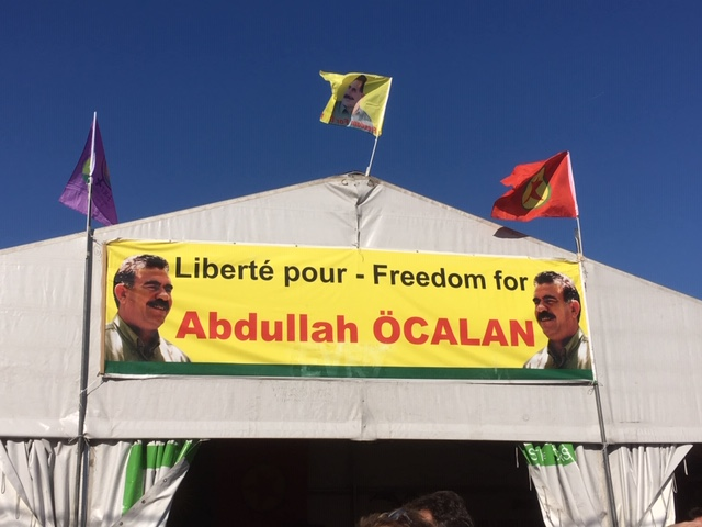 Fête de l'Humanité en 2018